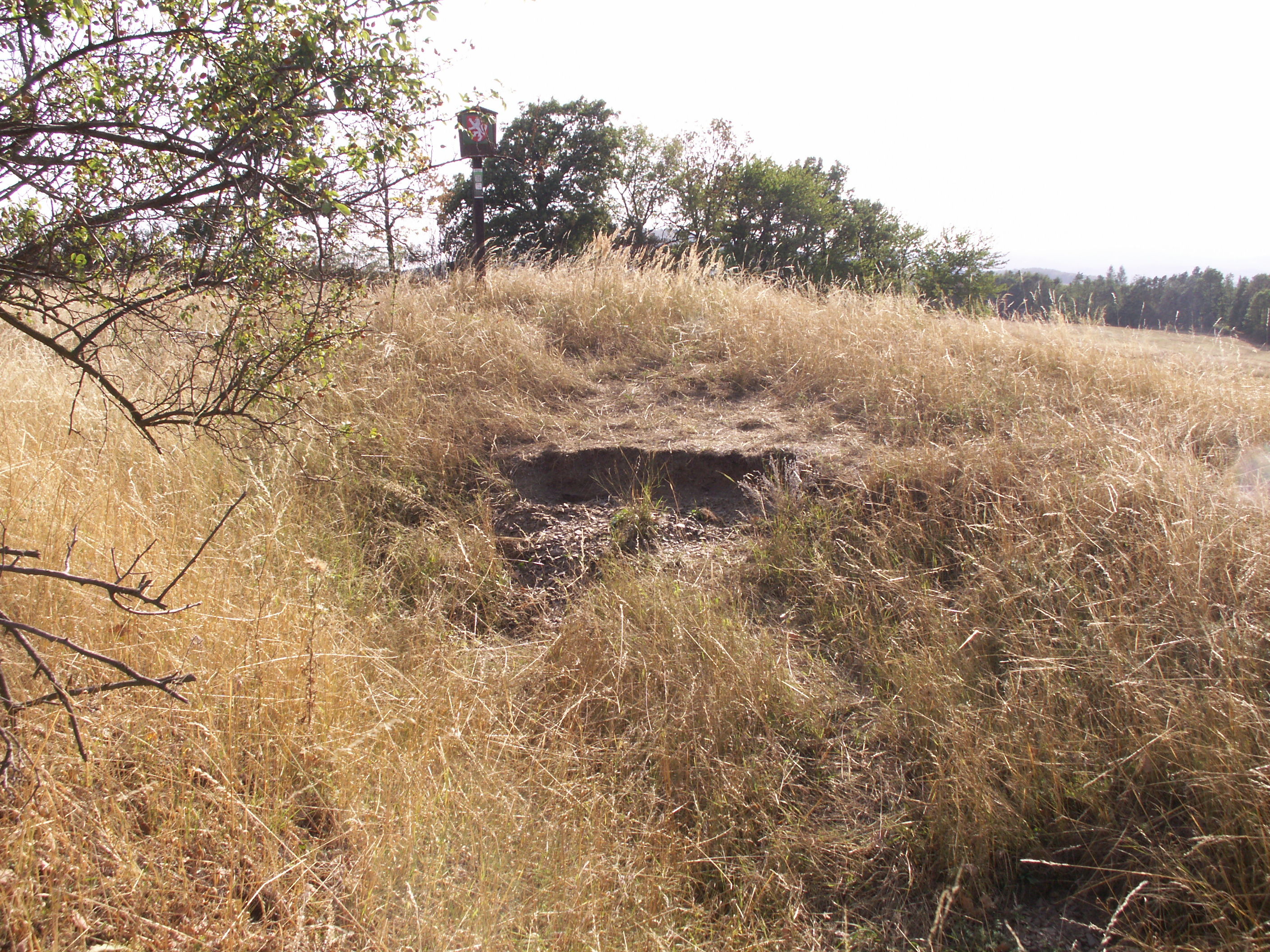 PR Oblík u Dívčího Hradu, ev.č. 283, okres Bruntál, Moravskoslezský kraj